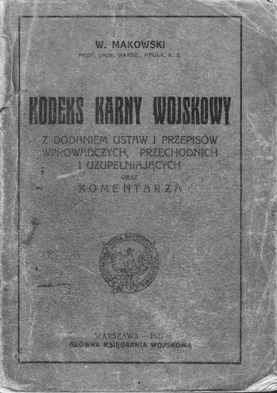 Wydanie Niemieckiego Wojskowego Kodeksu Karnego z 1872 z komentarzem ppłk korpusu sądowego prof. W. Makowskiego, Warszawa 1921. Wydanie polecone do użytku służbowego przez Ministra Spraw Wojskowych, pismem L.18961 (966) 20 U z 21.IX.1920